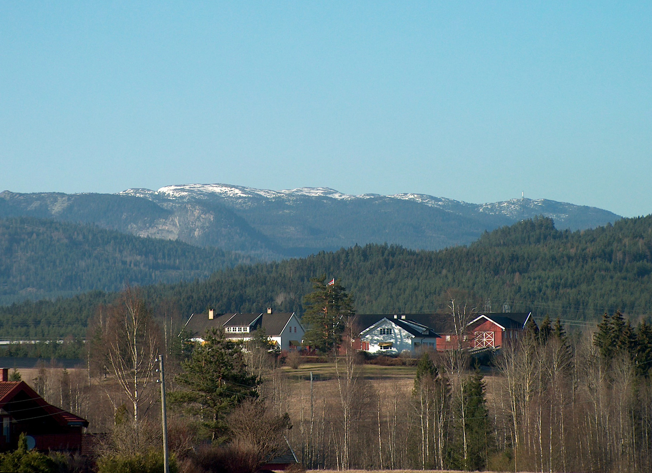 Utsyn mot Ådalsfjellene fra Soknedalen